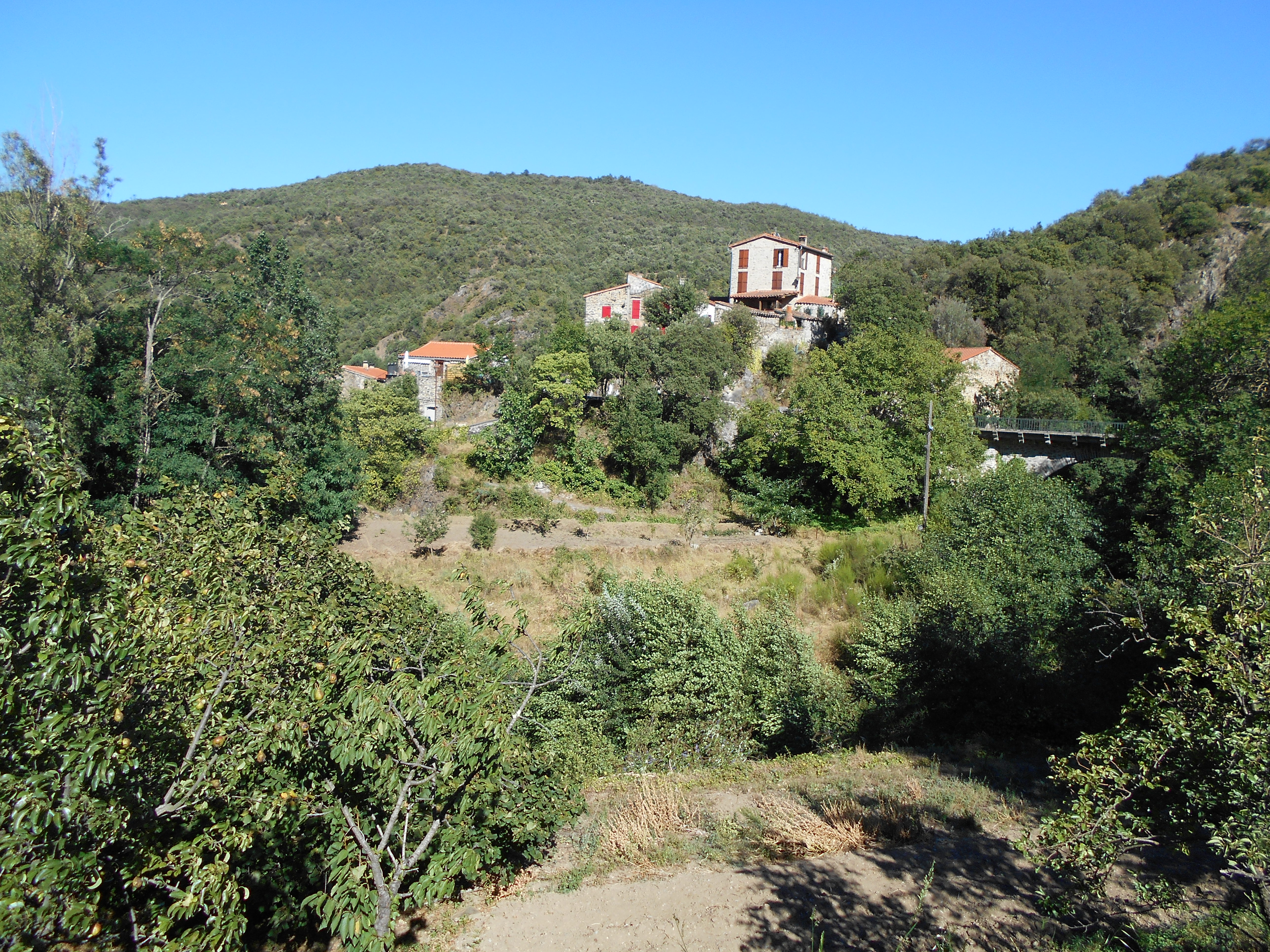 L'antic poble de Ministrol